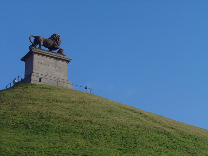 "Löwe von Waterloo" - Gedenkmonument in Erinnerung an die Schlacht bei Waterloo